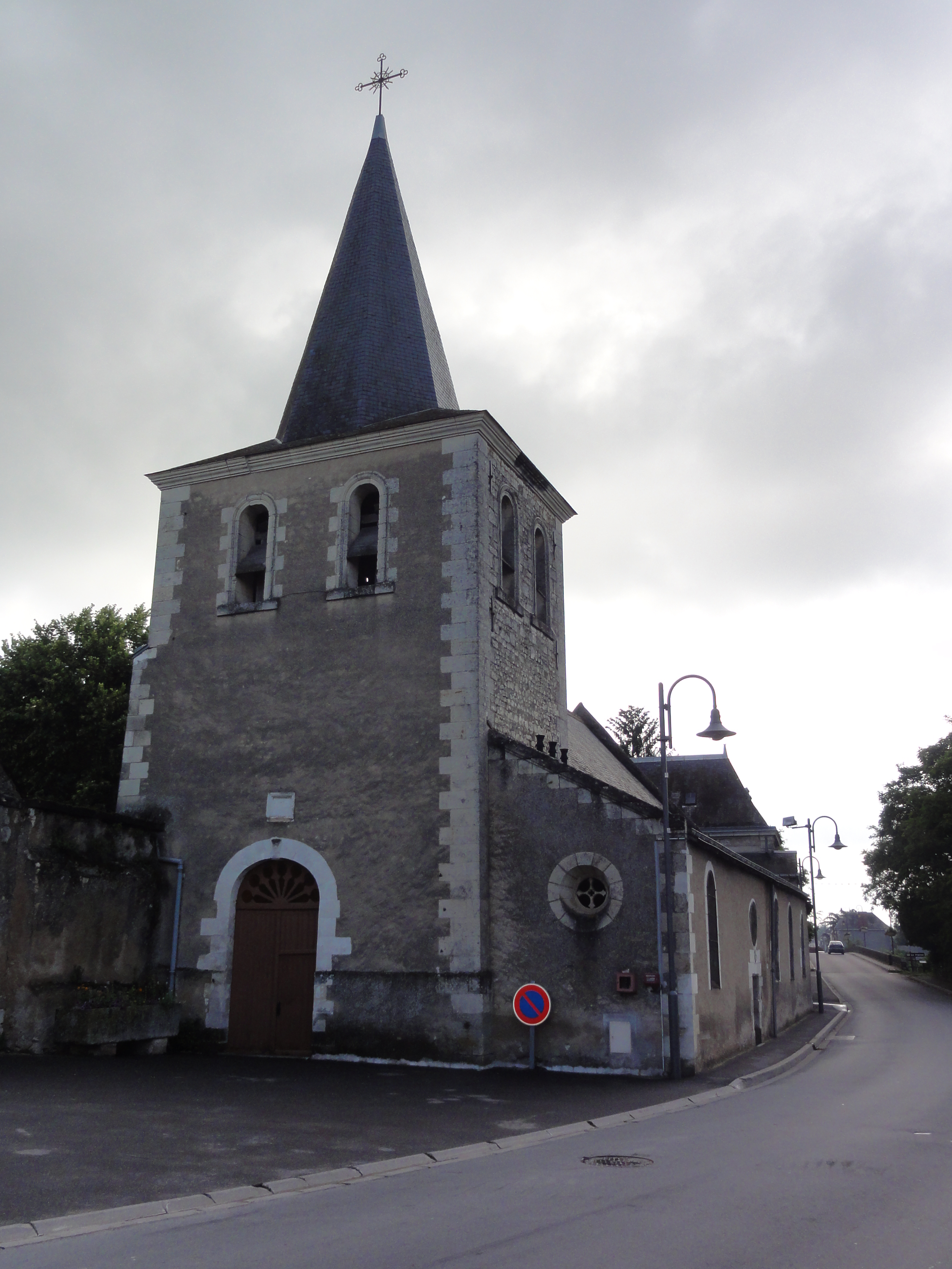 Dangé-Saint-Romain (Vienne) Église Saint-Romain de Saint-Romain